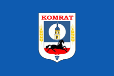 Флаг Комрата